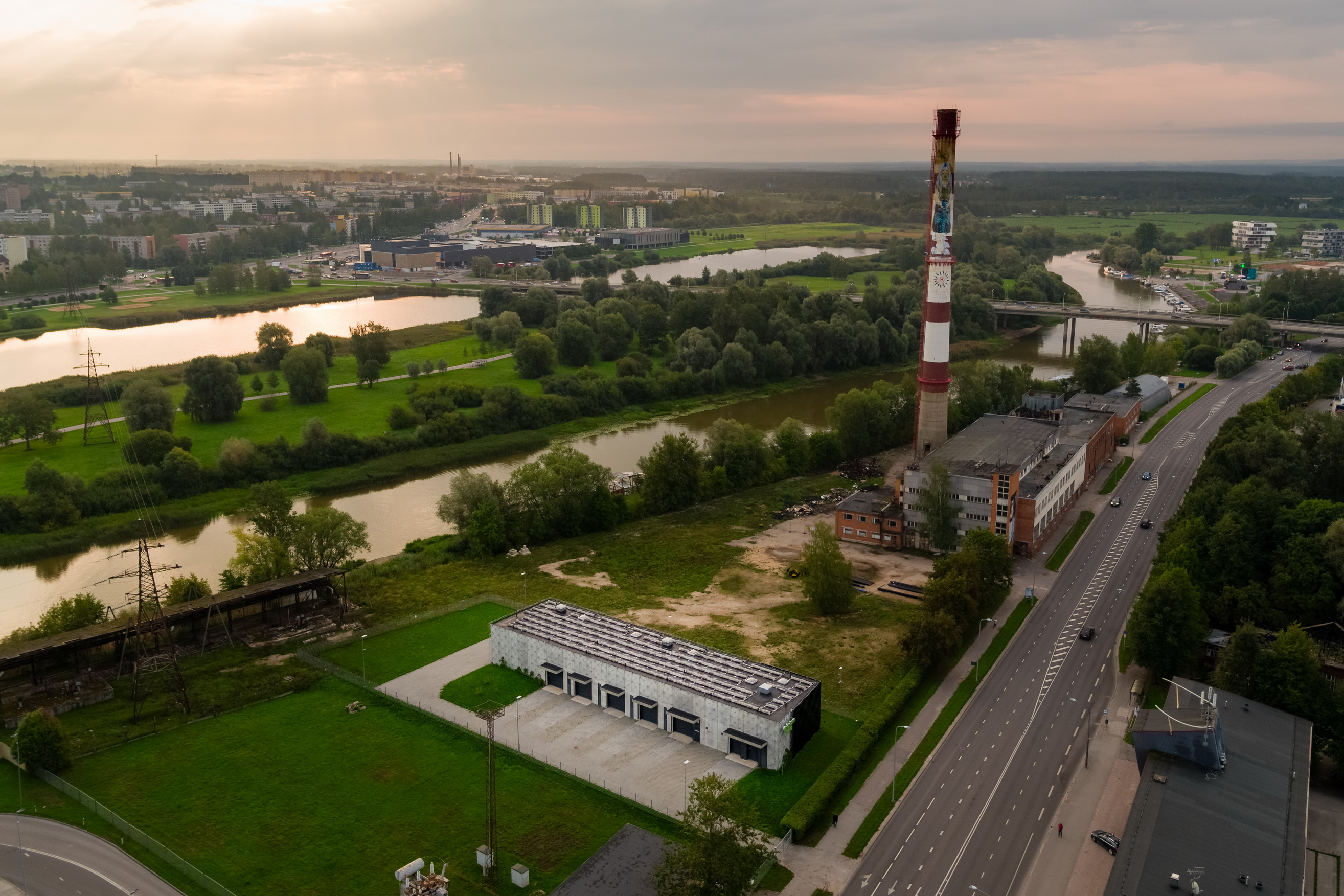 Tartu Kesklinna Külmajaam